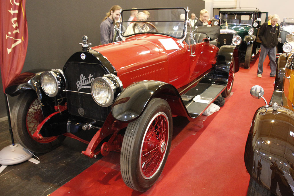 1921 Stutz Model K Roadster_IMG_2579